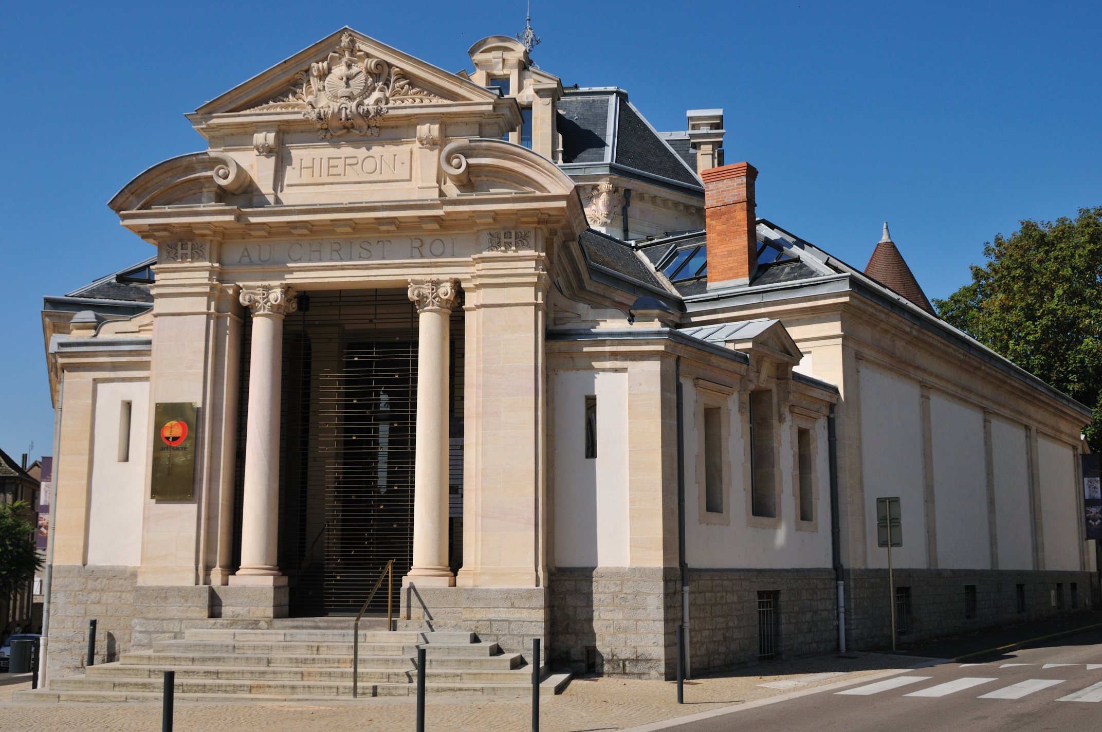 Musée eucharistique du Hiéron, Paray-le-Monial, Saône-et-Loire, France